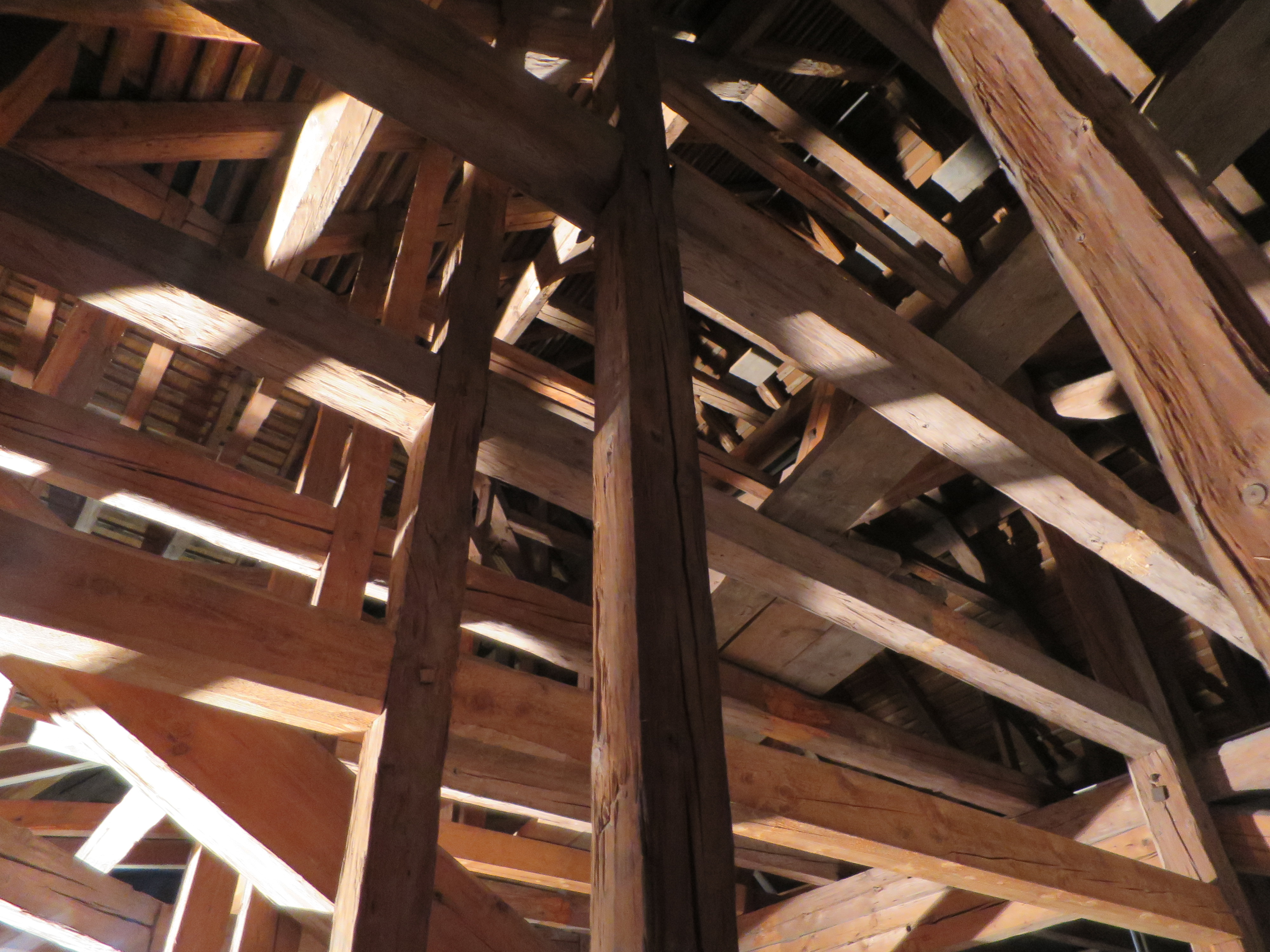 Reformierte Kirche Wädenswil - Dachstuhl